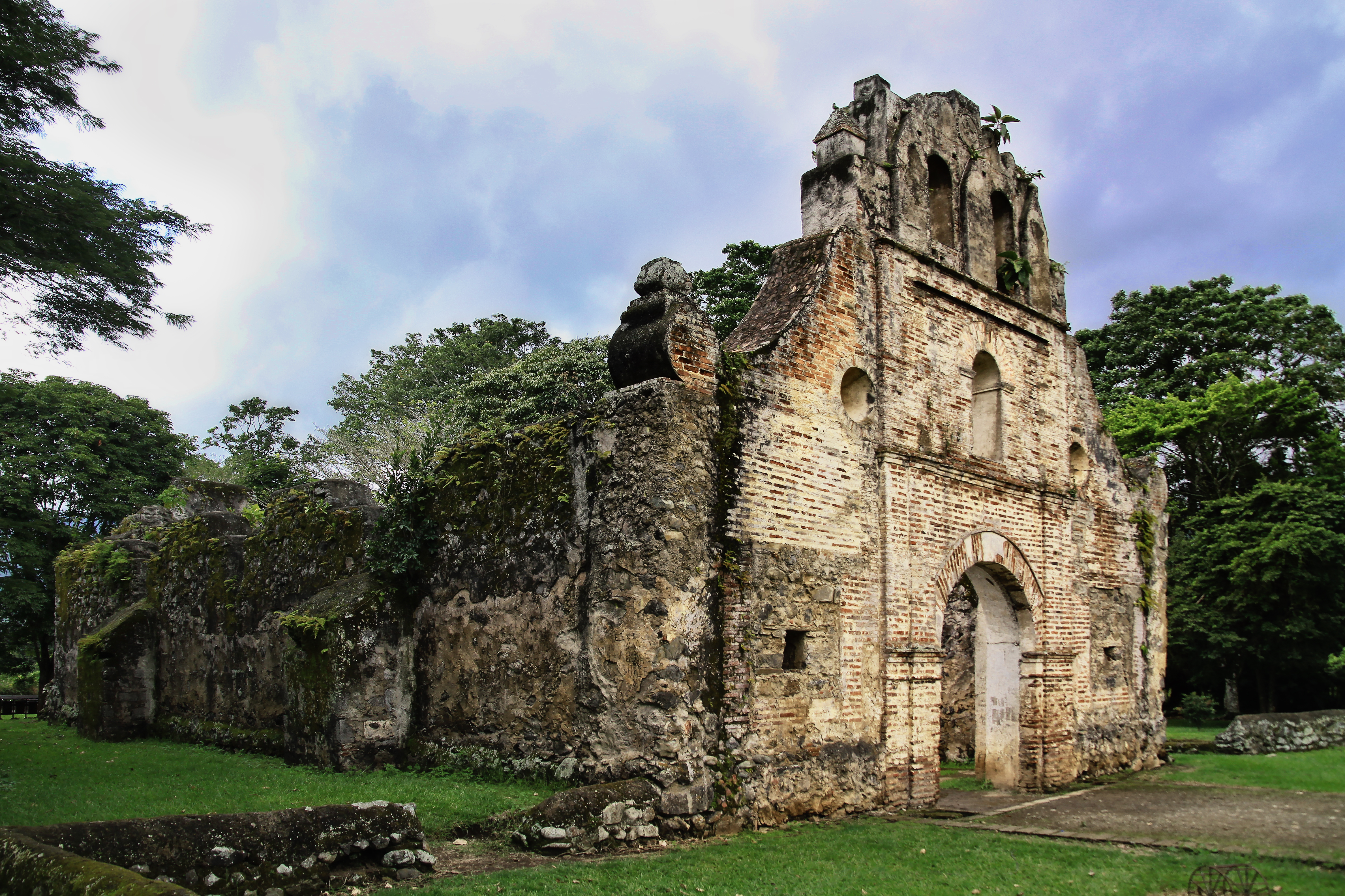 Iglesia de Ujarras, one of the oldest churches in Costa Rica, Iglesia de Nuestra Senora de la Limpia Concepcion, built in the 1560s